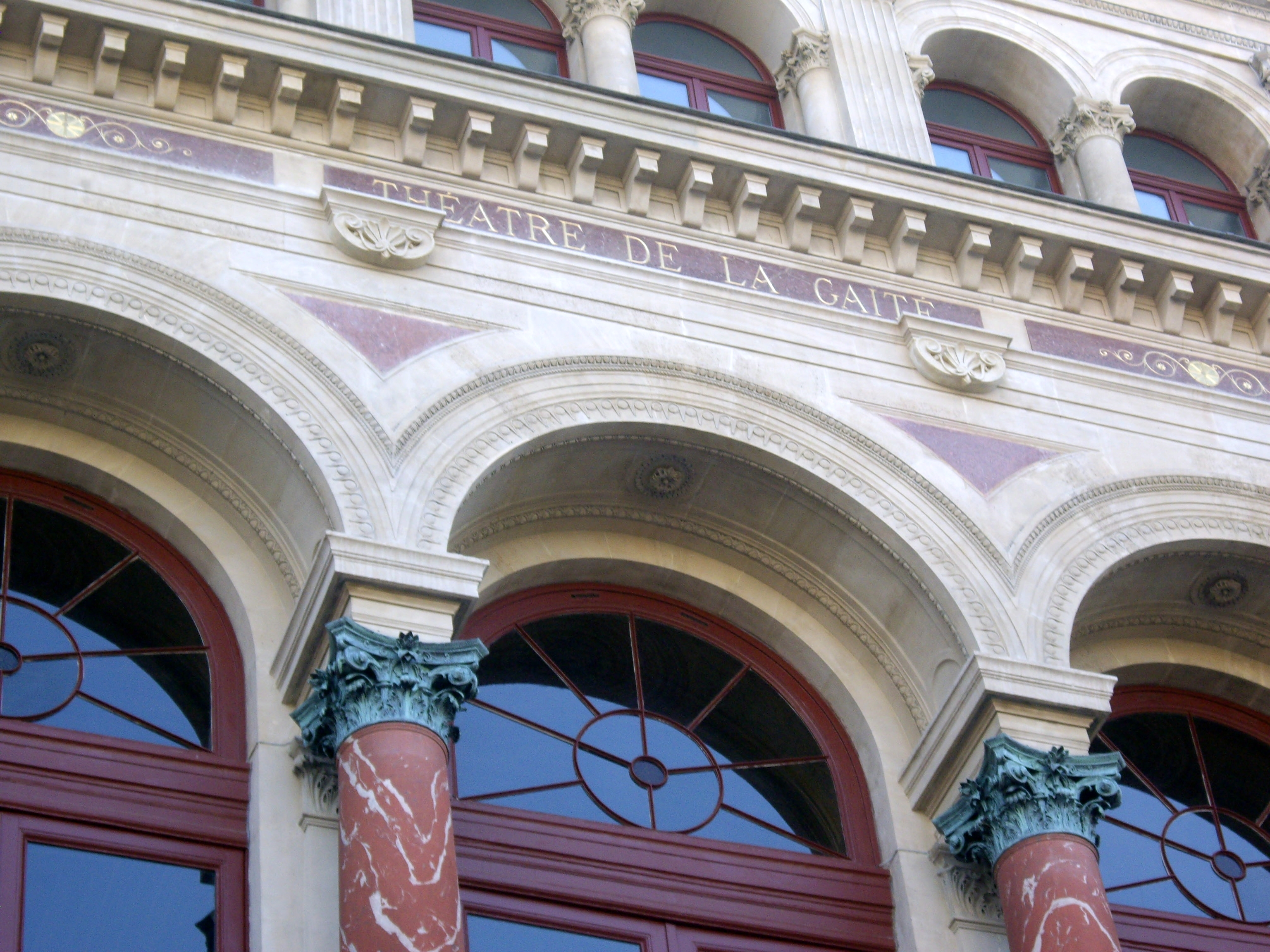 Théâtre de la Gaîté, 3 bis rue Papin, Paris 3e. Détail de la façade.